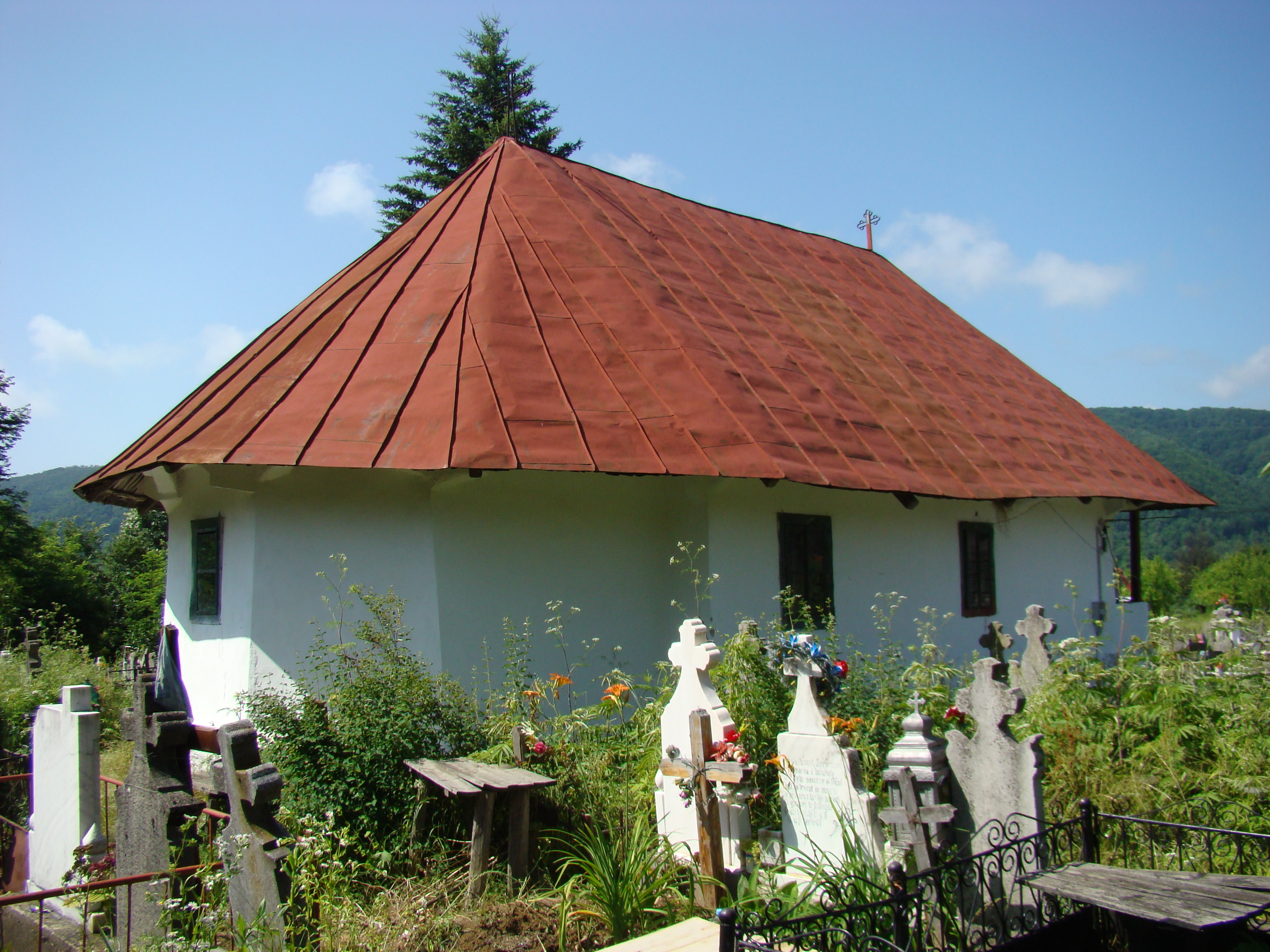 Biserica de lemn „Sfântul Dumitru” din Negoiești, județul Mehedinți